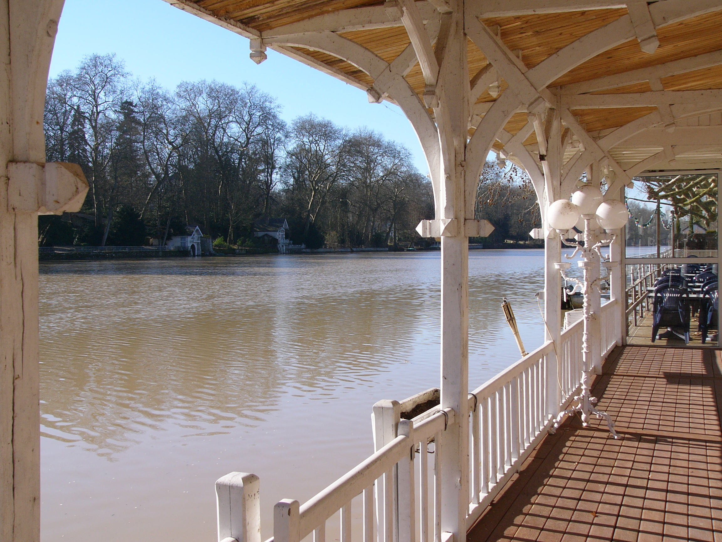 La terrasse du restaurant « Le Pavillon Bleu » au bord du Loiret, Olivet, Loiret, France